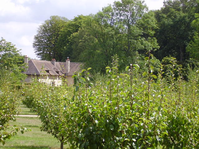 Les vergers de Port-Royal-des-Champs